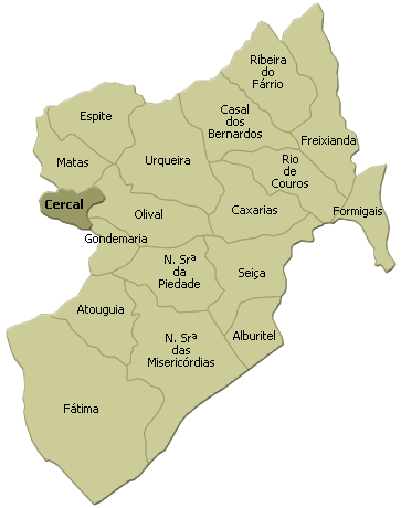 localisation de cercal sur la freguesia de ourem